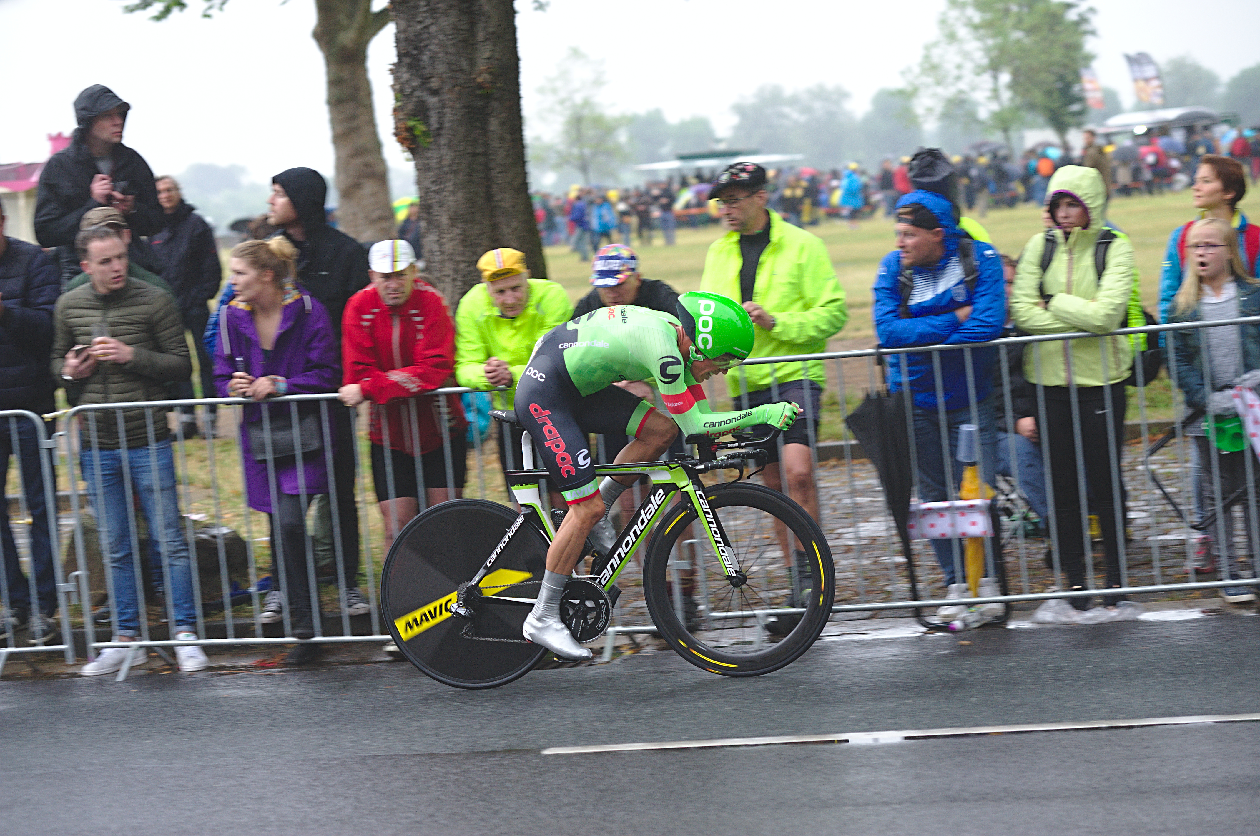 Einzelzeitfahren beim Grand Départ in Düsseldorf, Tour de France 2017.